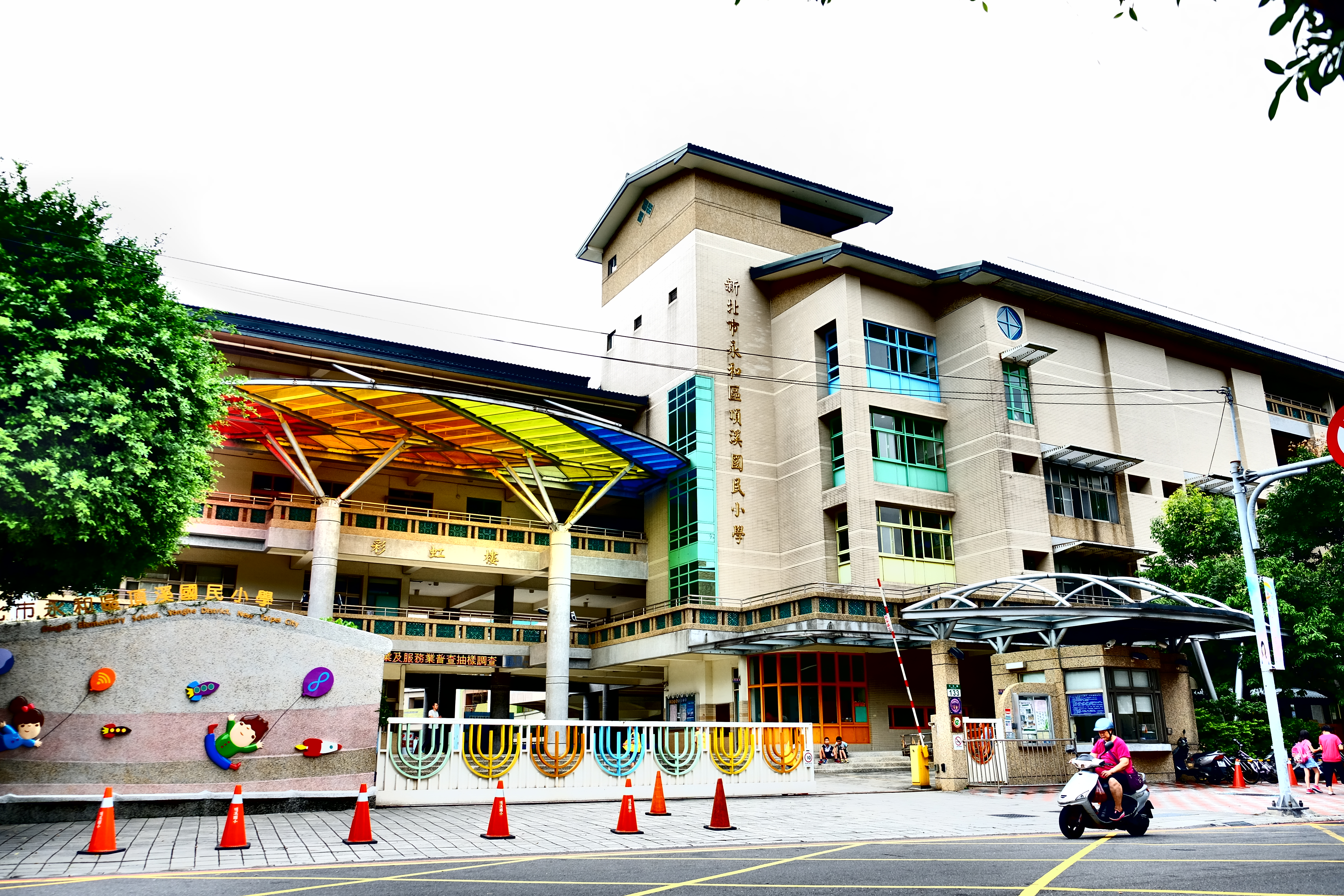 2016年新北市永和區頂溪國民小學